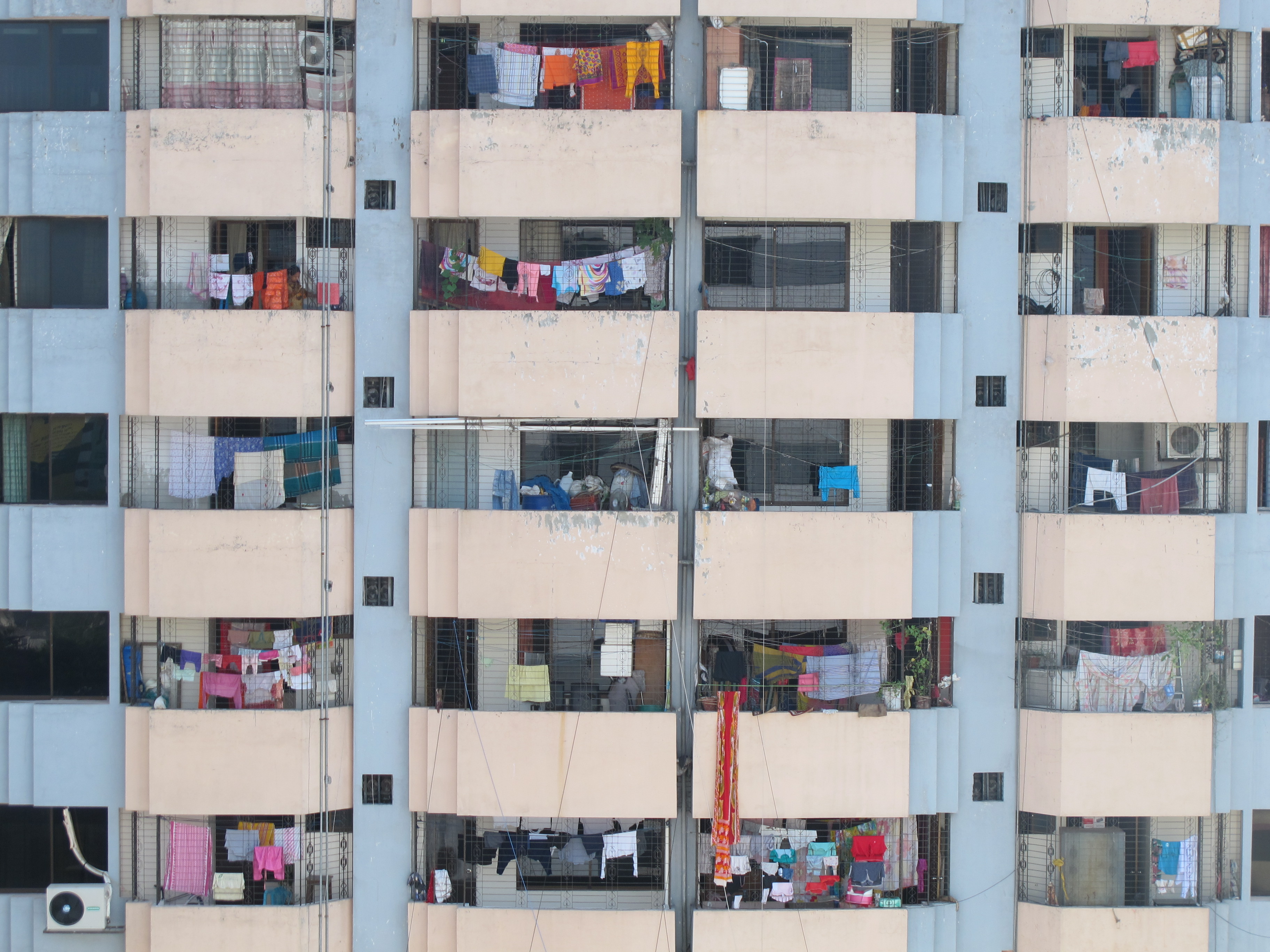 Blick aus dem Hotelfenster des Hotel71 in Dhaka